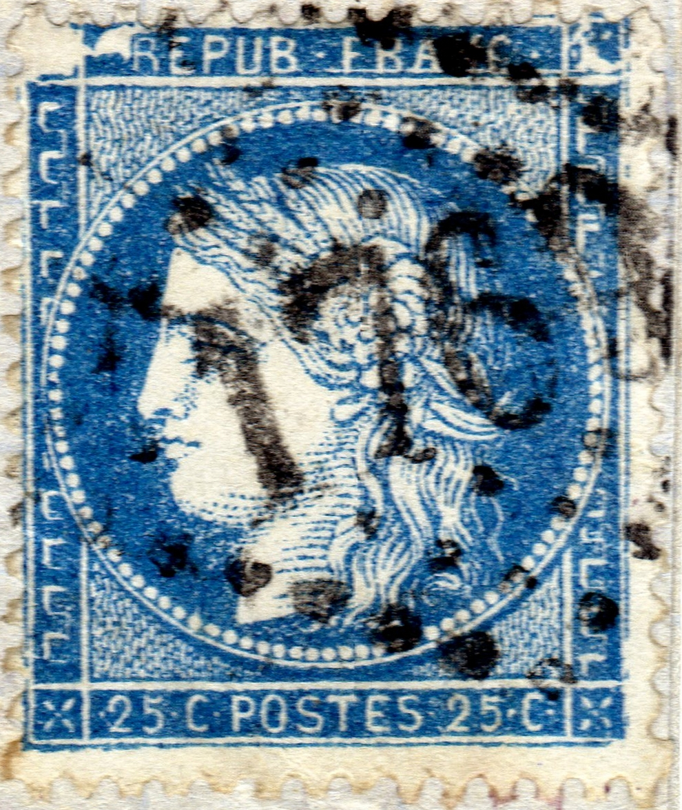 Timbre Cérès de 1871 - 25 c - variété dite "Grande Cassure"